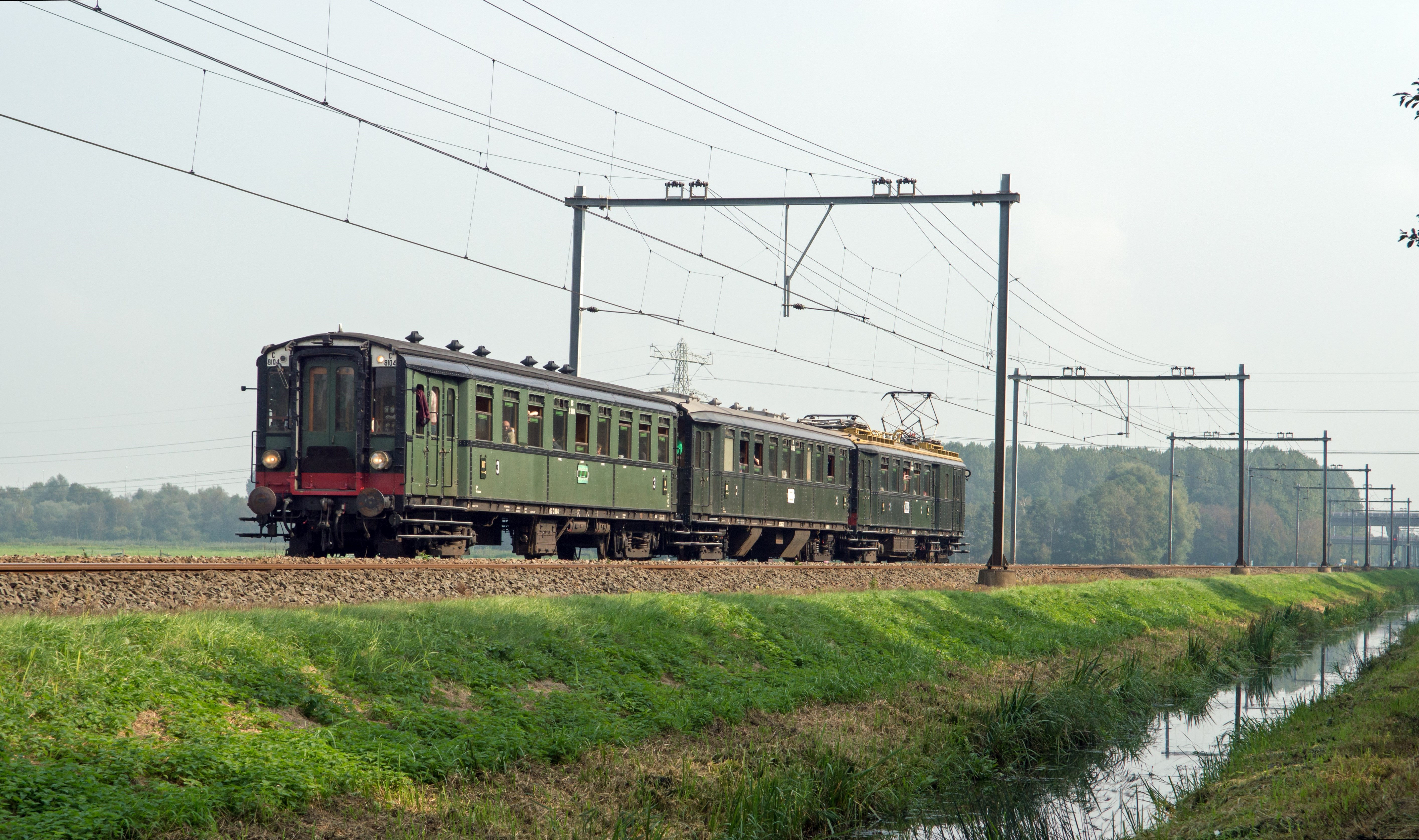 Ter gelegenheid van 175 jaar spoor in Nederland reden er op 20-09-2014 verschillende museumtreinen tussen Amsterdam en Haarlem. Hier reed de Arend 175 jaar geleden voor het eerst met passagiers. Tussen Halfweg en Spaarnwoude (Haarlemmerliede) rijdt de 'Blokkendoos' (Mat '24) richting Haarlem.